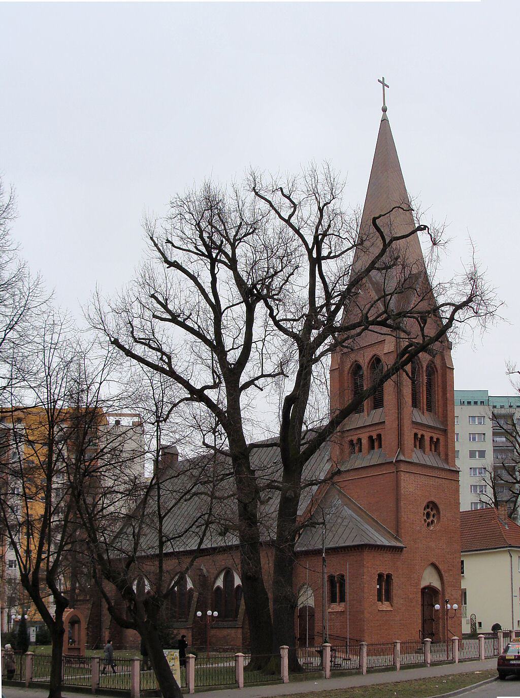 Kościół św. Ducha w Szczecinie Zdrojach (zabytek nr rejestr. 321)